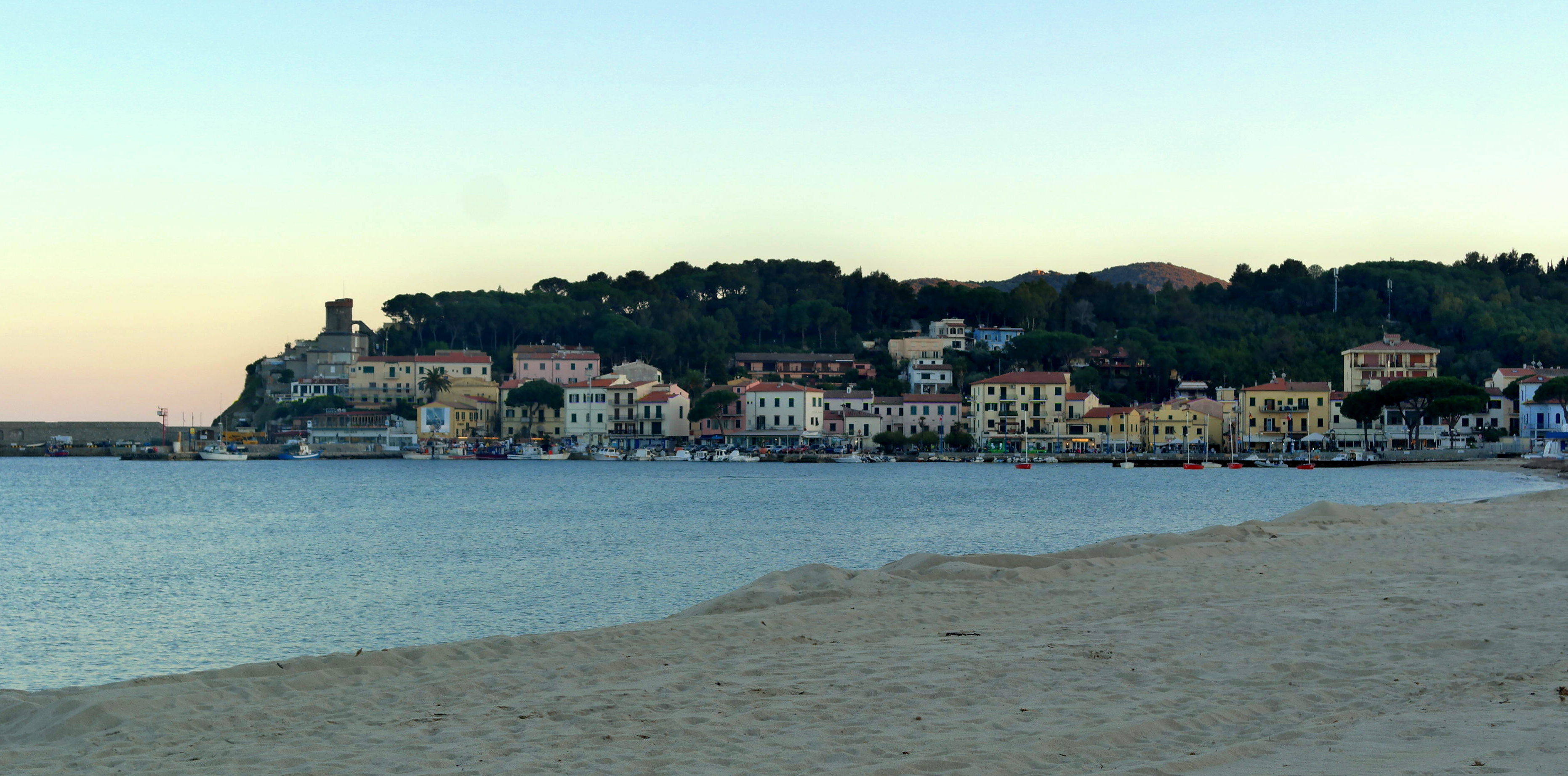 Veduta dell'Abitato di Marina di Campo (Isola d'Elba)